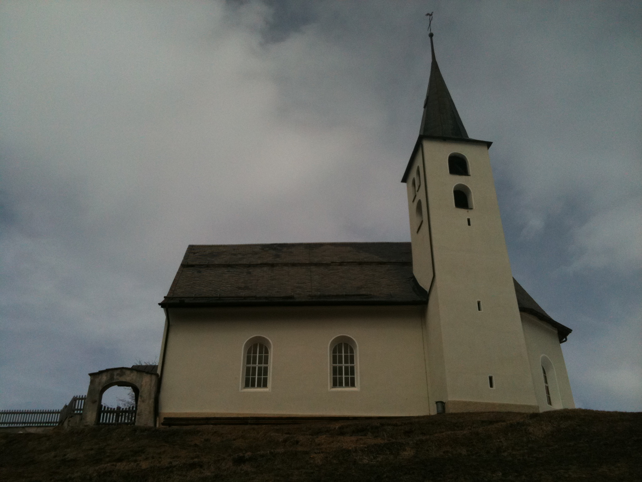 reformierte Kirche in Tschappina, Heinzenberg, Kanton Graubünden